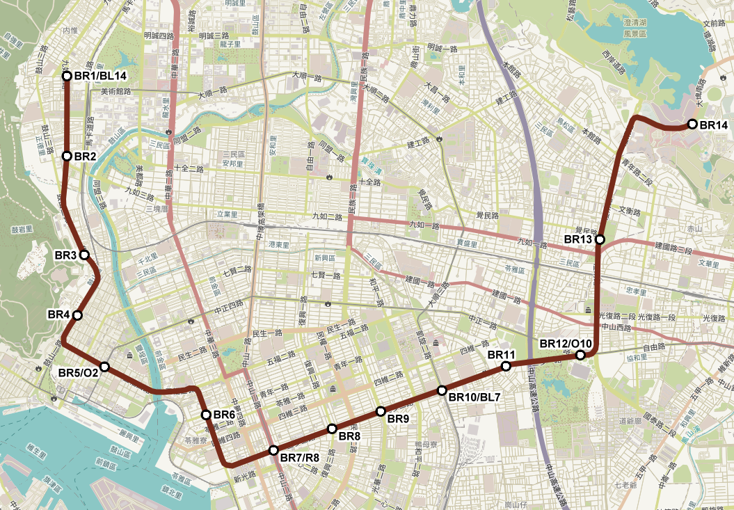 高雄捷運棕線 1993年版本